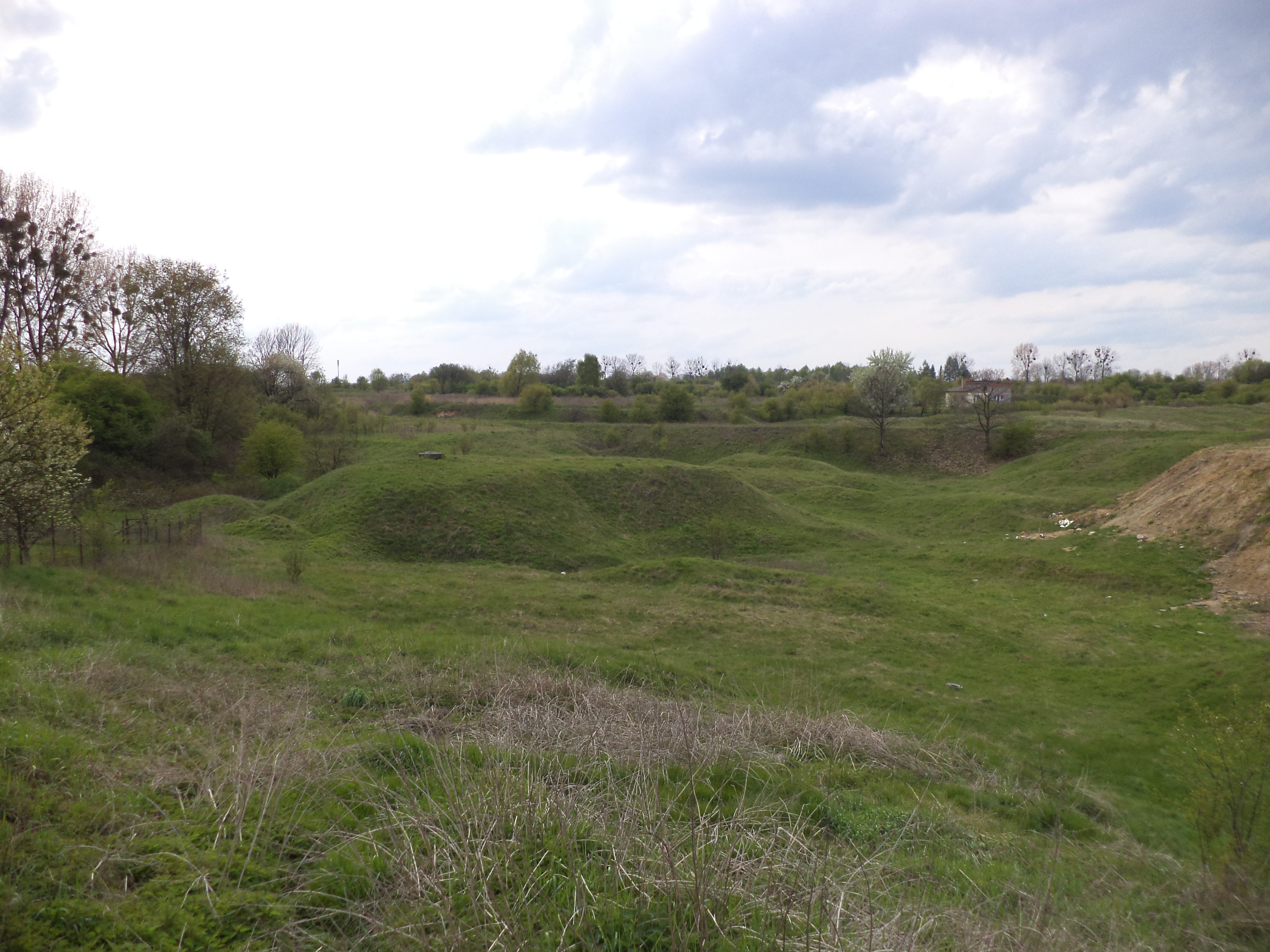 Krajobraz pogórniczy (warpie) widoczny w okolicy ul. Staszica w Tarnowskich Górach